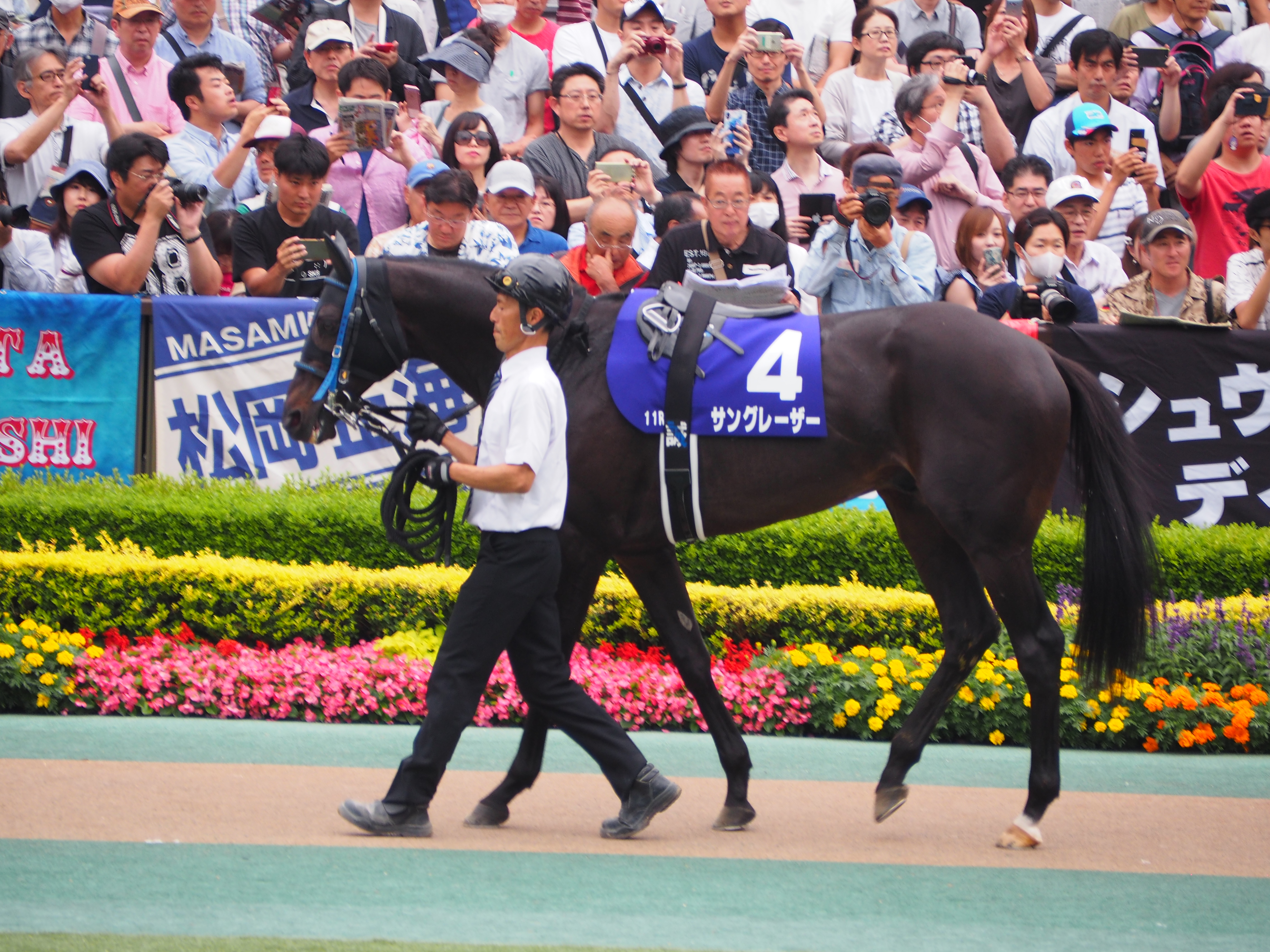 安田記念 パドック 2019